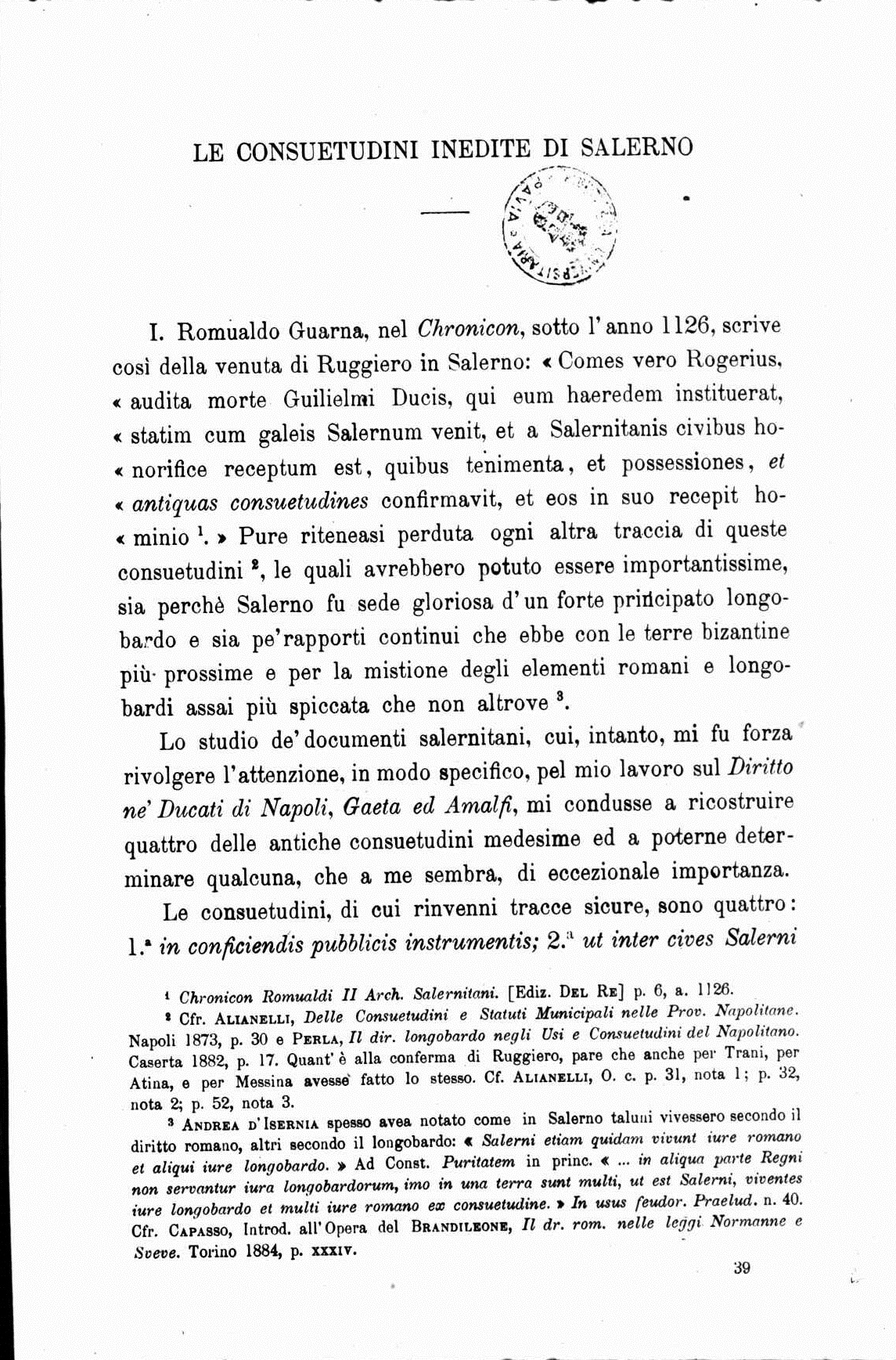 Pagina 305